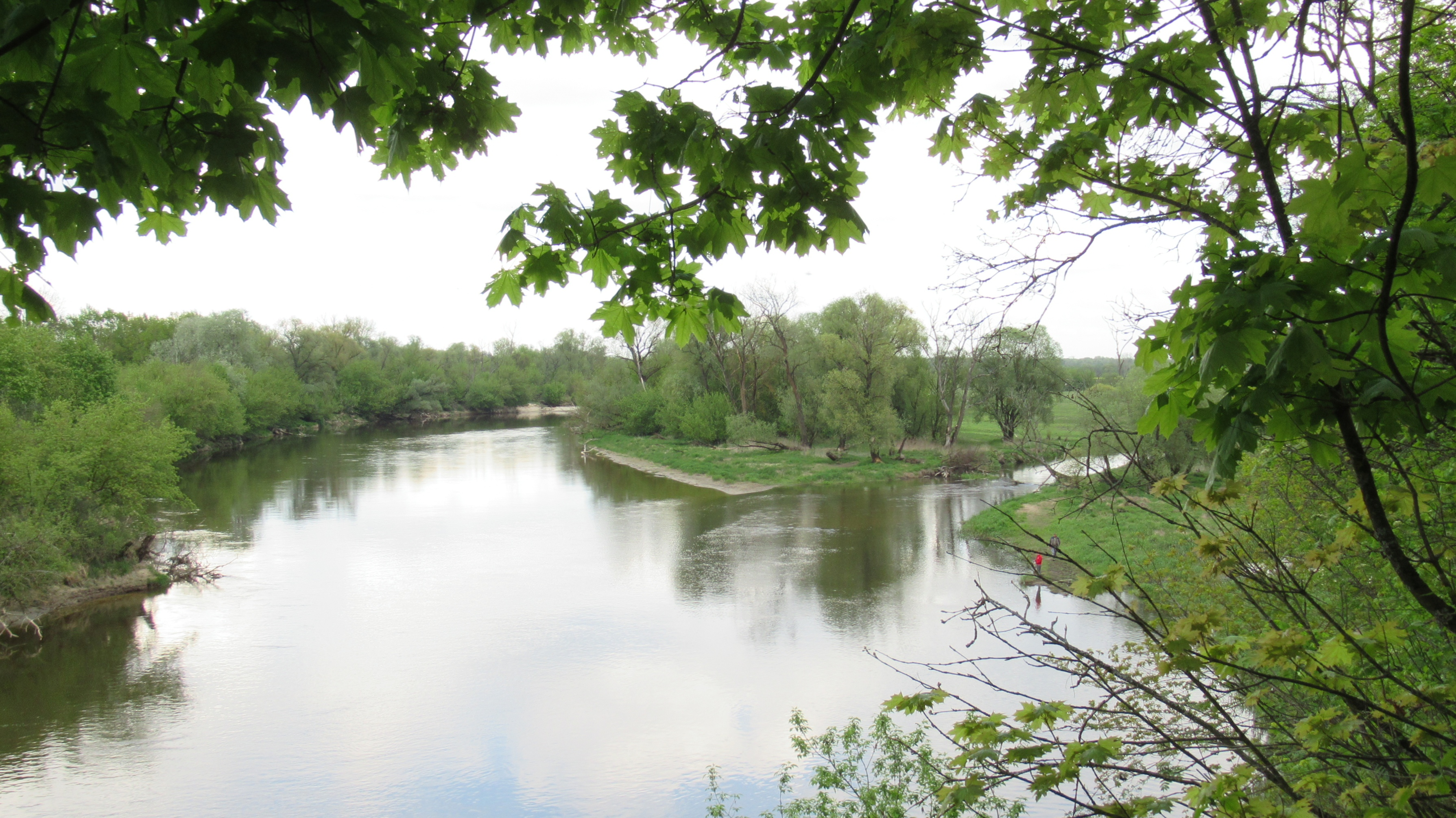 Rezerwat „Szwajcaria Podlaska”. Miejsce, gdzie Krzna wpada do Bugu.